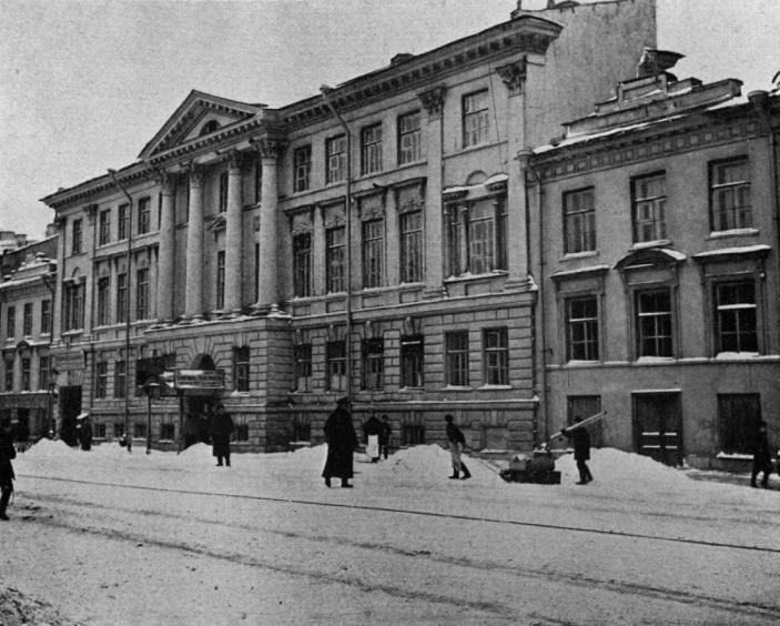 Здание Управы благочиния по адресу Садовая улица, 55 в Санкт-Петербурге, на месте которого ныне стоит Дом городских учреждений.